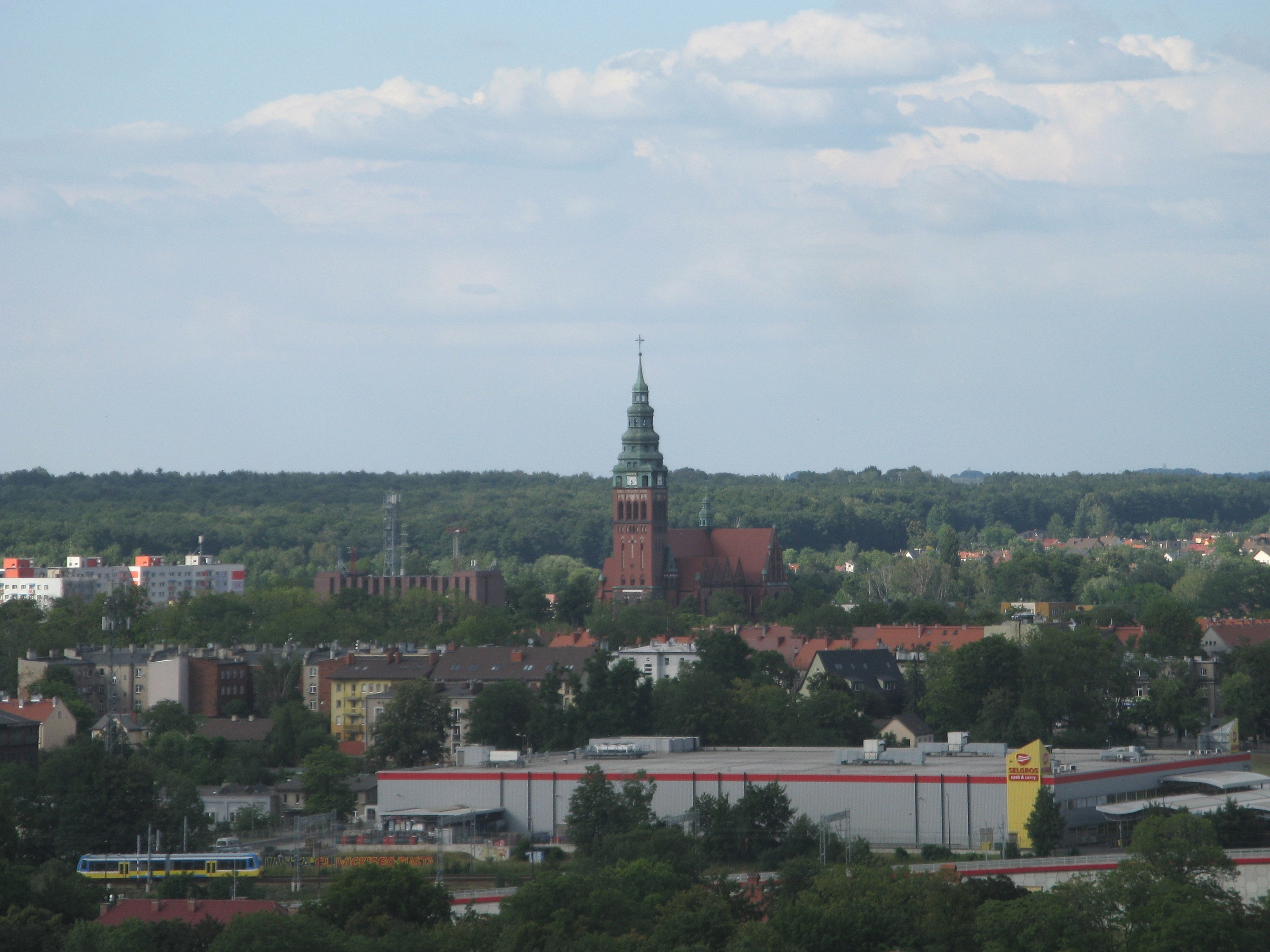 Panorama Szobiszowic, dzielnicy Gliwic, w centrum nowy kościół św. Bartłomieja, widok z wieży kościoła Wszystkich Świętych w Gliwicach.